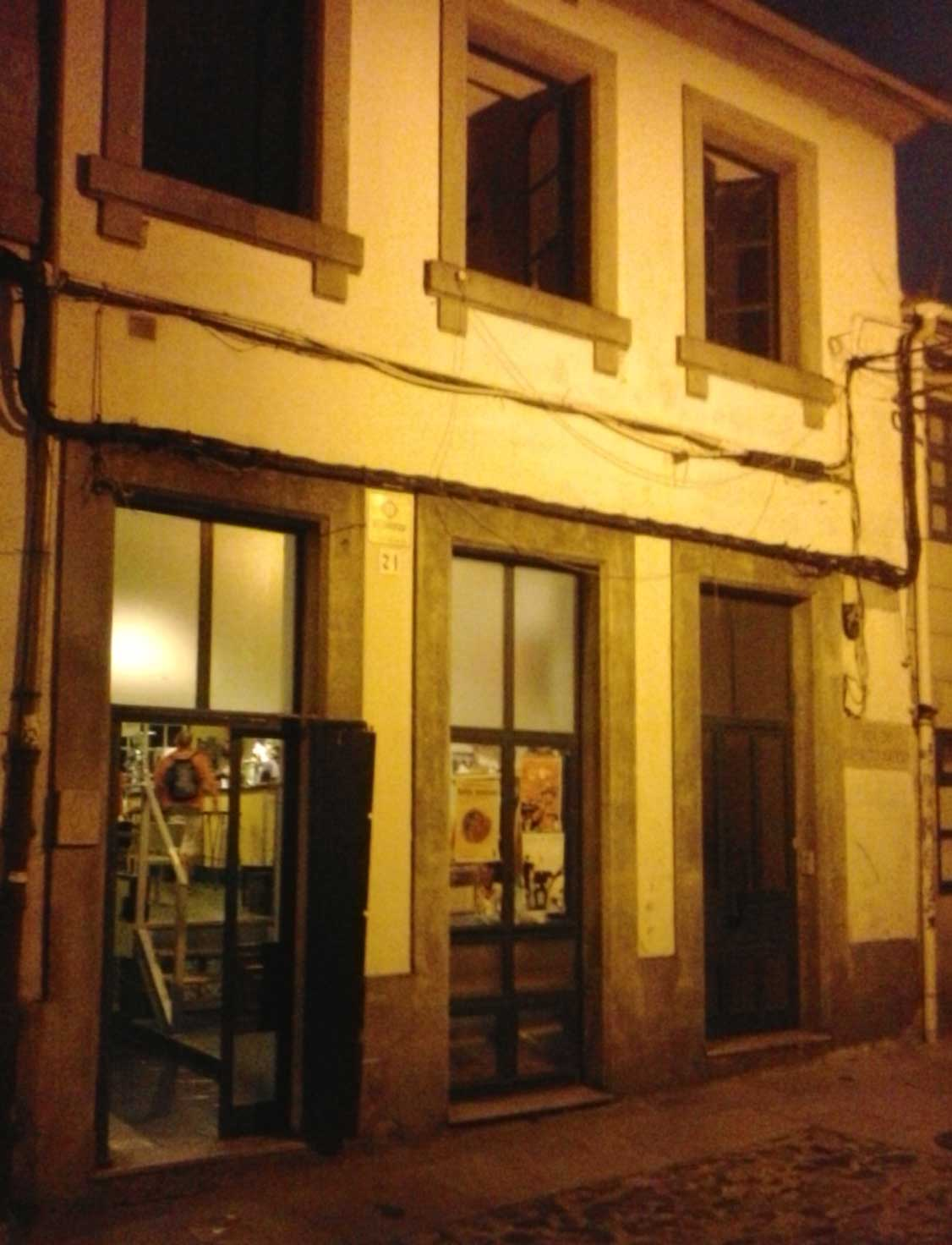 Local social da Gentalha do Pichel en Compostela, Galiza